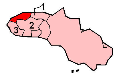 Het Laura tussen de andere talen van Soemba (Oost-Nusa Tenggara, Indonesië). Eigen werk, vrij voor het publiek.